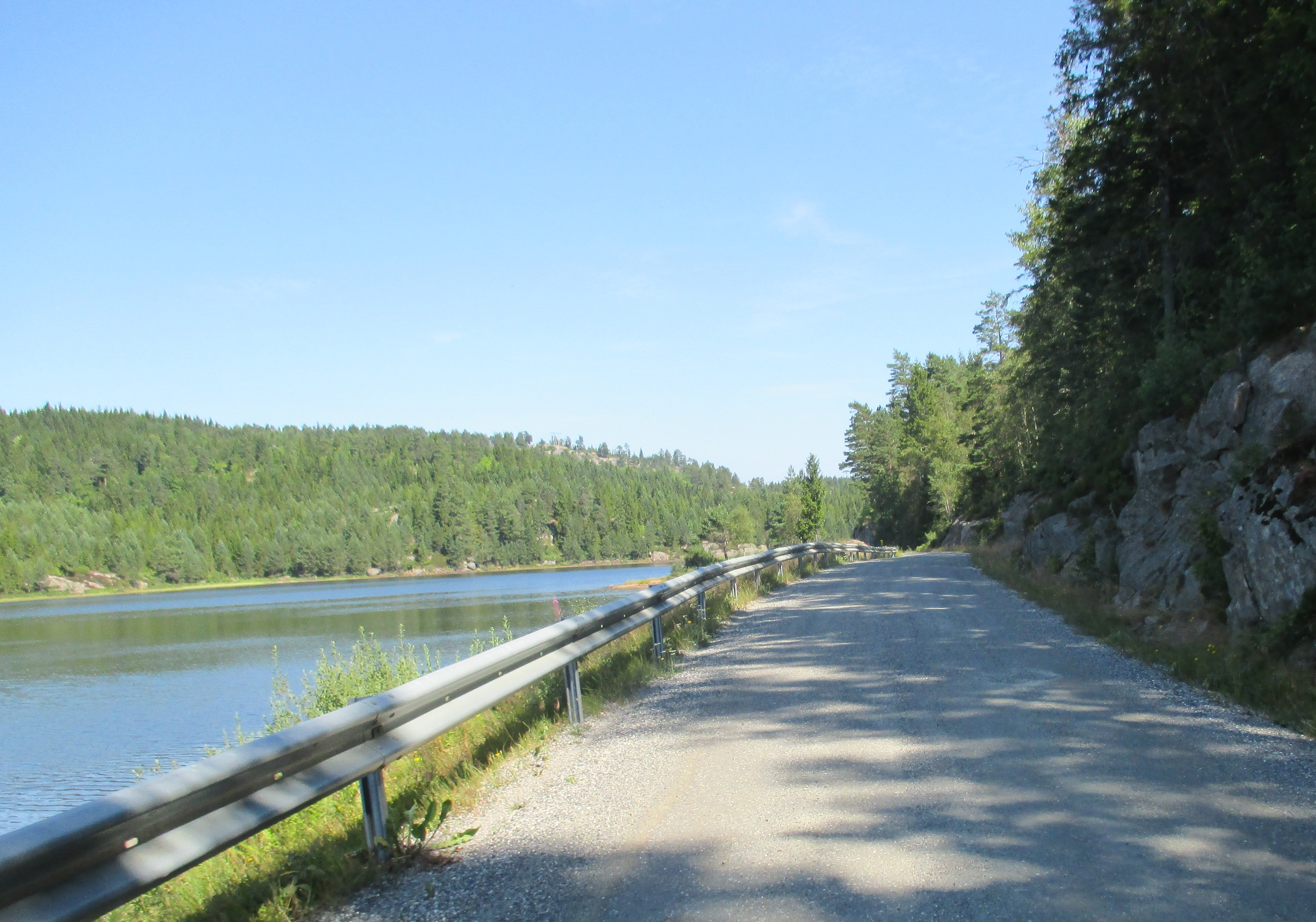 Fylkesvei 251 ved Hundlandsvannet